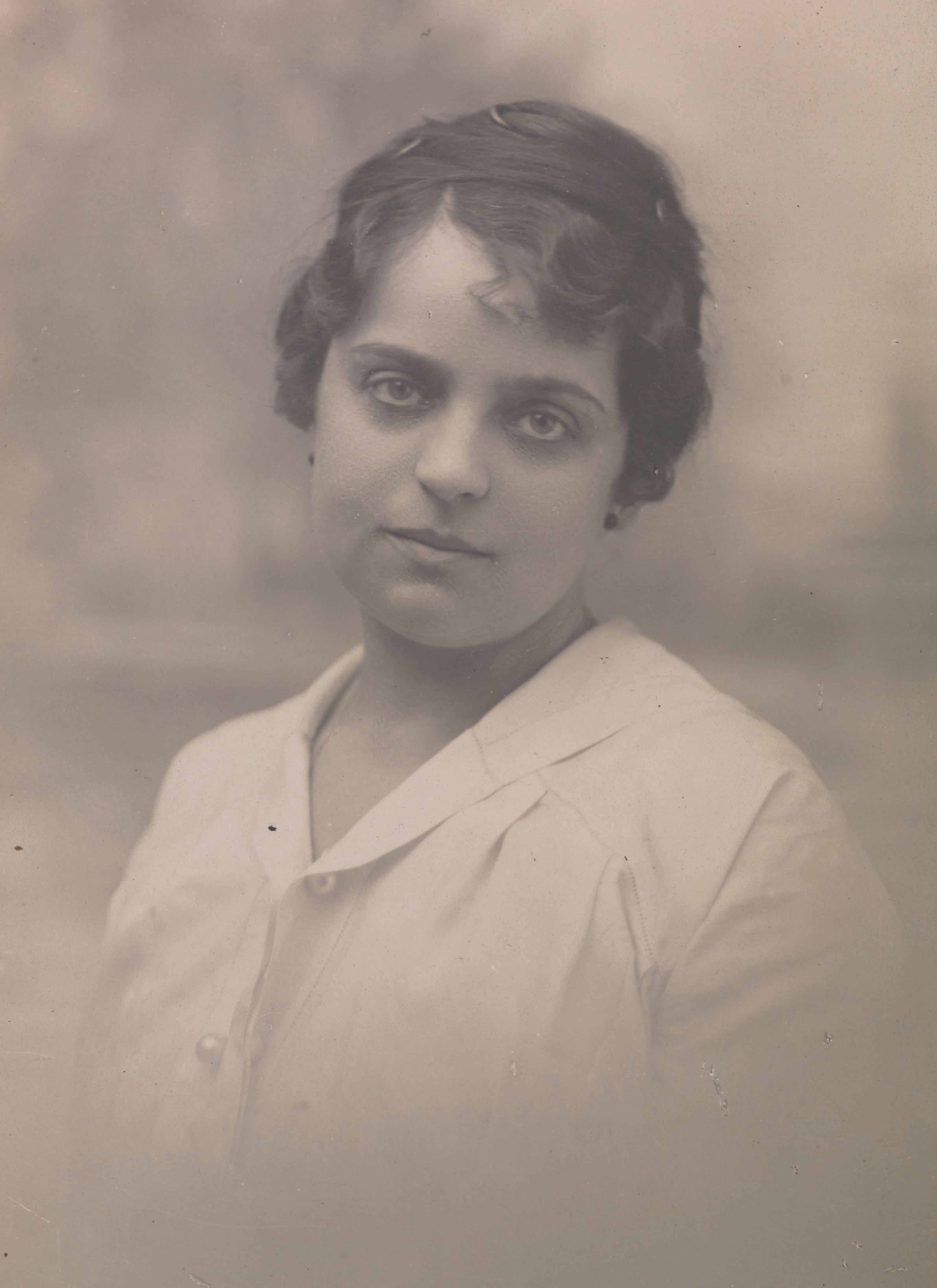 Maria Mokrzycka, 1918 r.